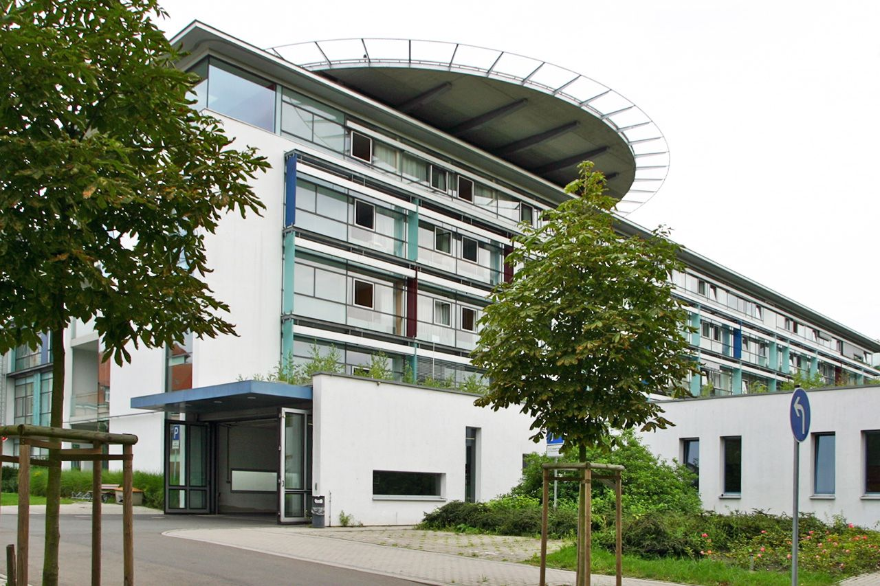 Das Klinikum St. Georg ist das älteste und nach den Universitätskliniken zweitgrößte Krankenhaus in Leipzig.